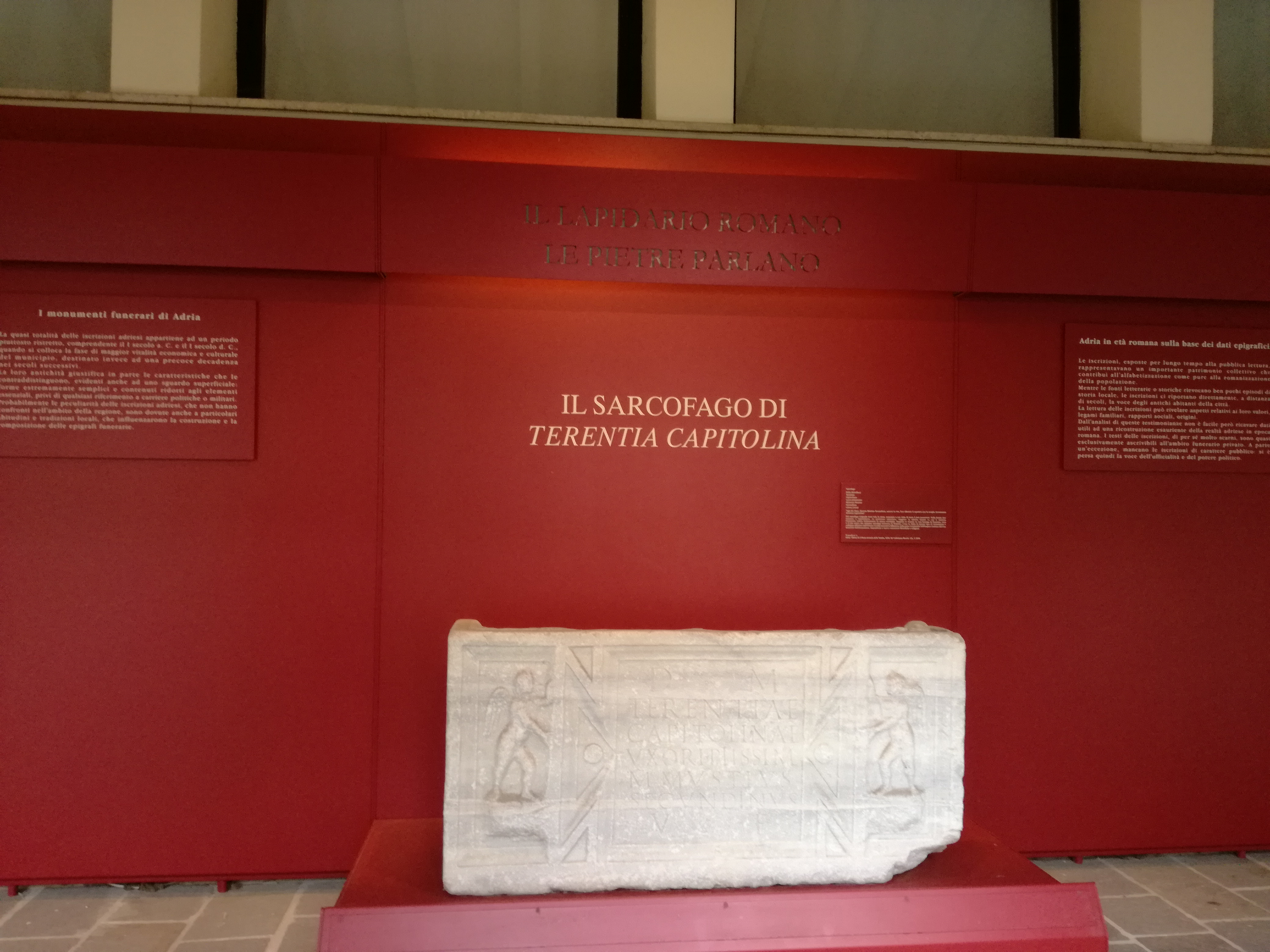 Sarcofago di Terentia Capitolina ubicato nel lapidario romano del Museo Archeologico Nazionale di Adria.